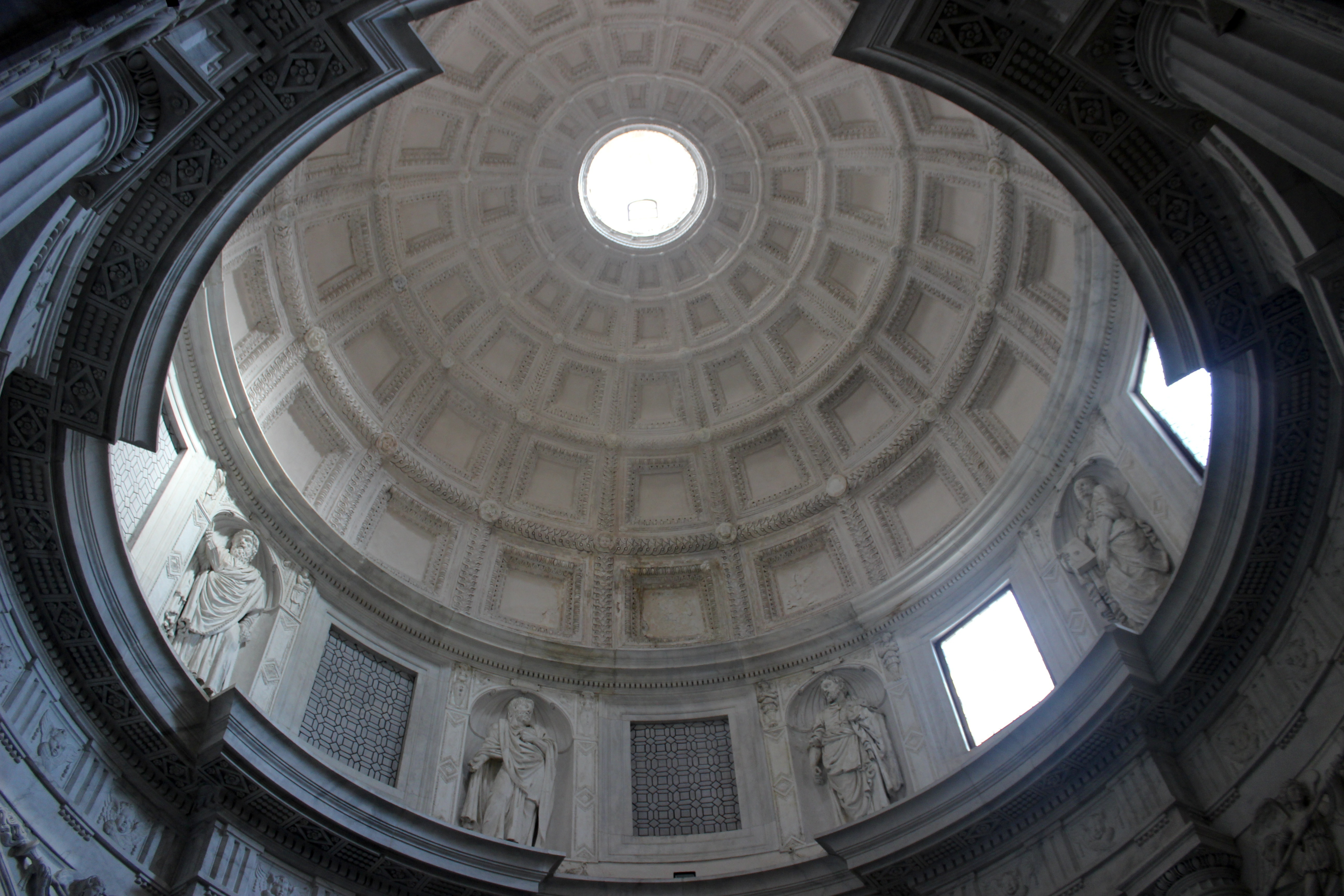 Nápoles. San Giovanni a Carbonara. Capilla Caracciolo di Vico. Cúpula.